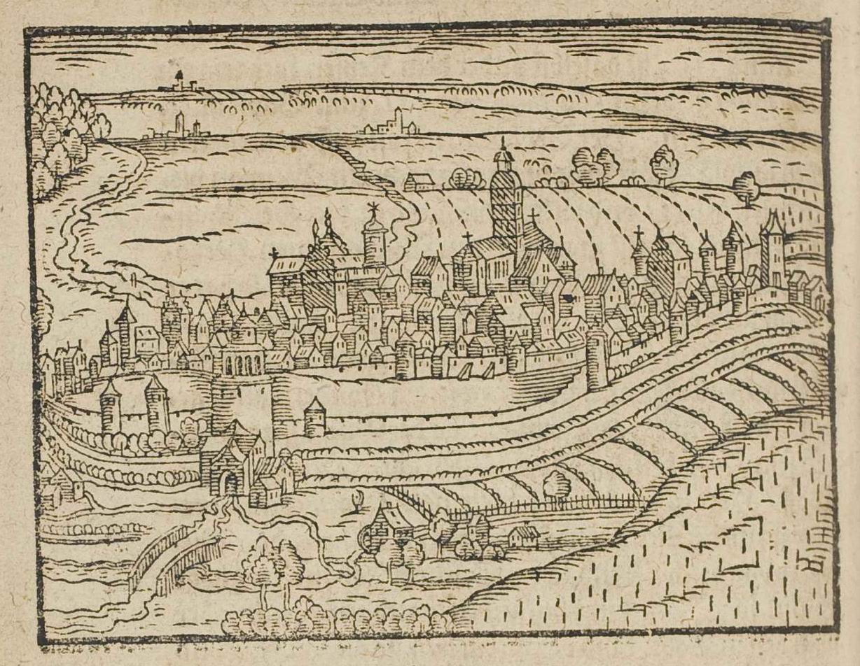 from: Abraham Saur: Theatrum Urbium. Warhafftige Contrafeytung/ und Summarische Beschreibung/ fast aller vornemen und namhafftigen Stätten/ Schlössern und Klöster ..., Frankfurt : Richter, 1610 (Erstausgabe: 1593)